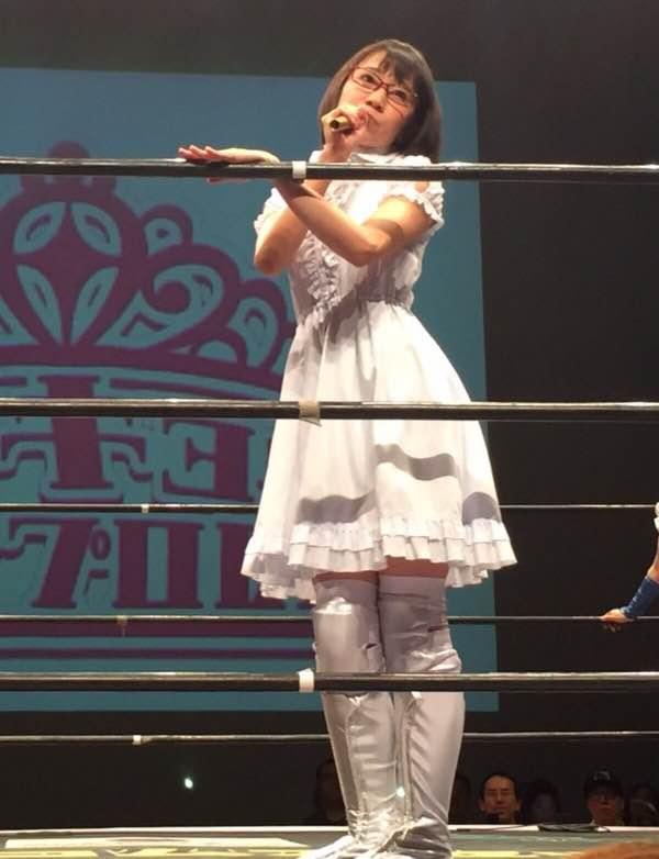 2015年新宿FACE